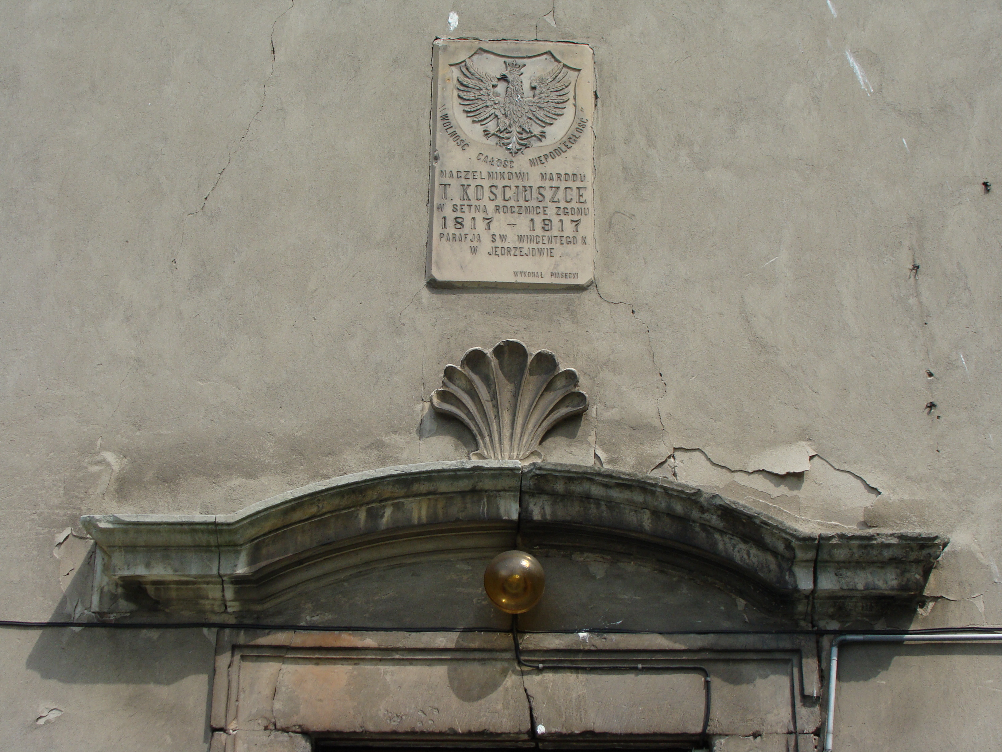 Wolność, Całość, Niepodległość Jędrzejów